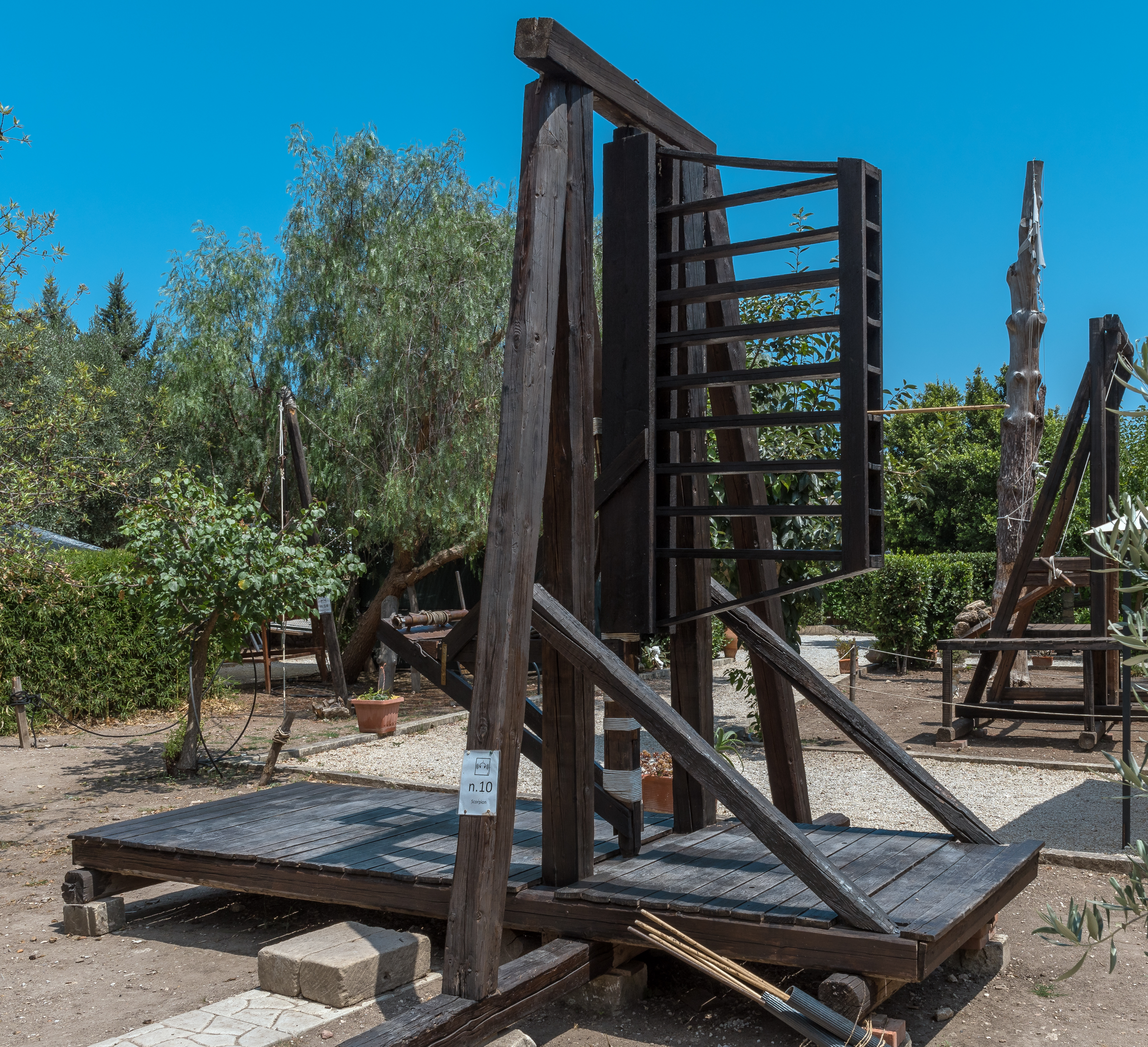 Moderne Rekonstruktion eines Skorpions, die der Beschreibung Vegitius in Epitoma und der Skizzierung von Valturio in De Re Militari nahe kommt. Ausgestellt im Technikpark Archimedes in Syrakus, unweit des Parco Archeologico della Neapoli